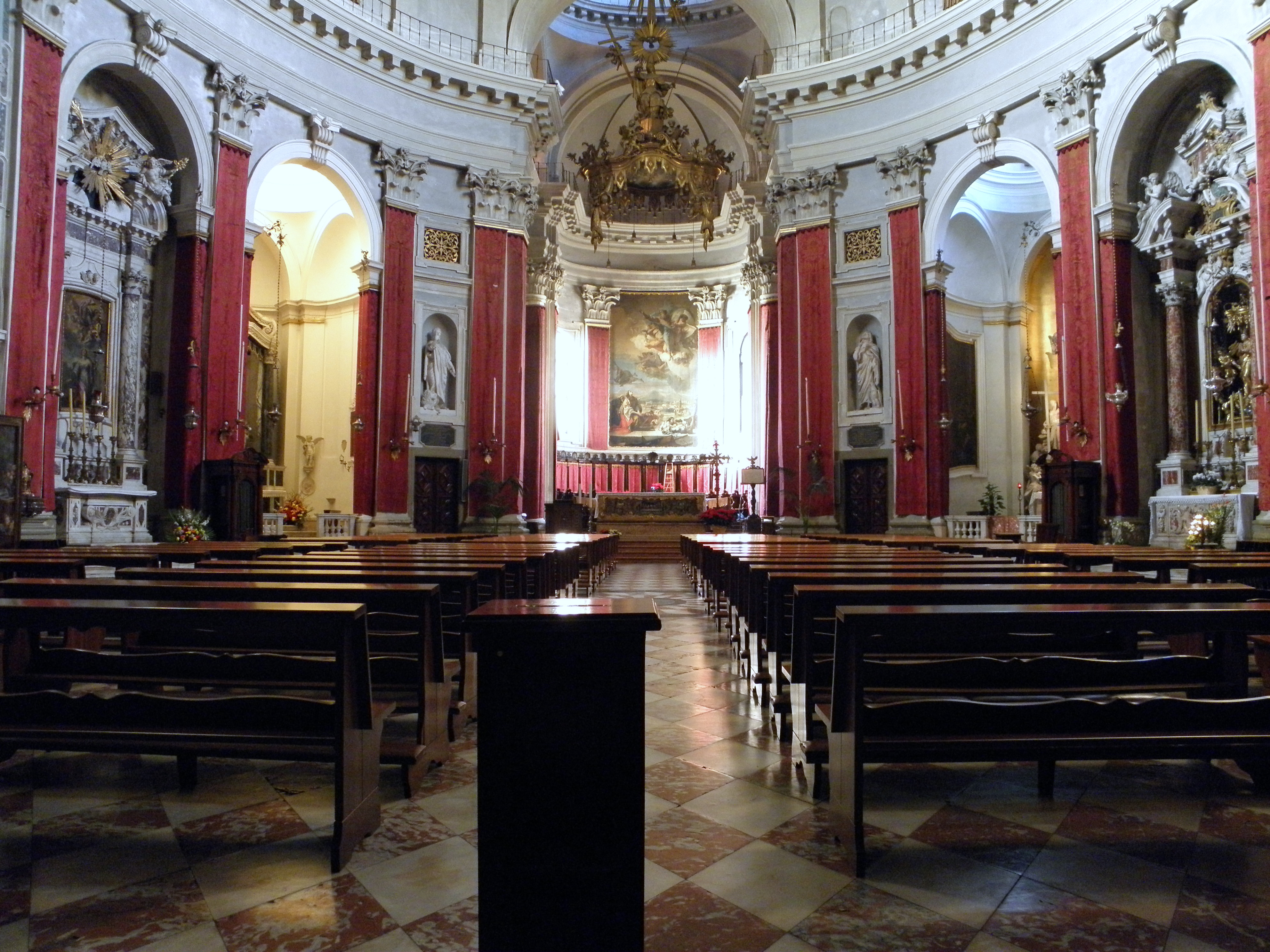 Este, Duomo di Santa Tecla: interno con vista sull'altare maggiore.